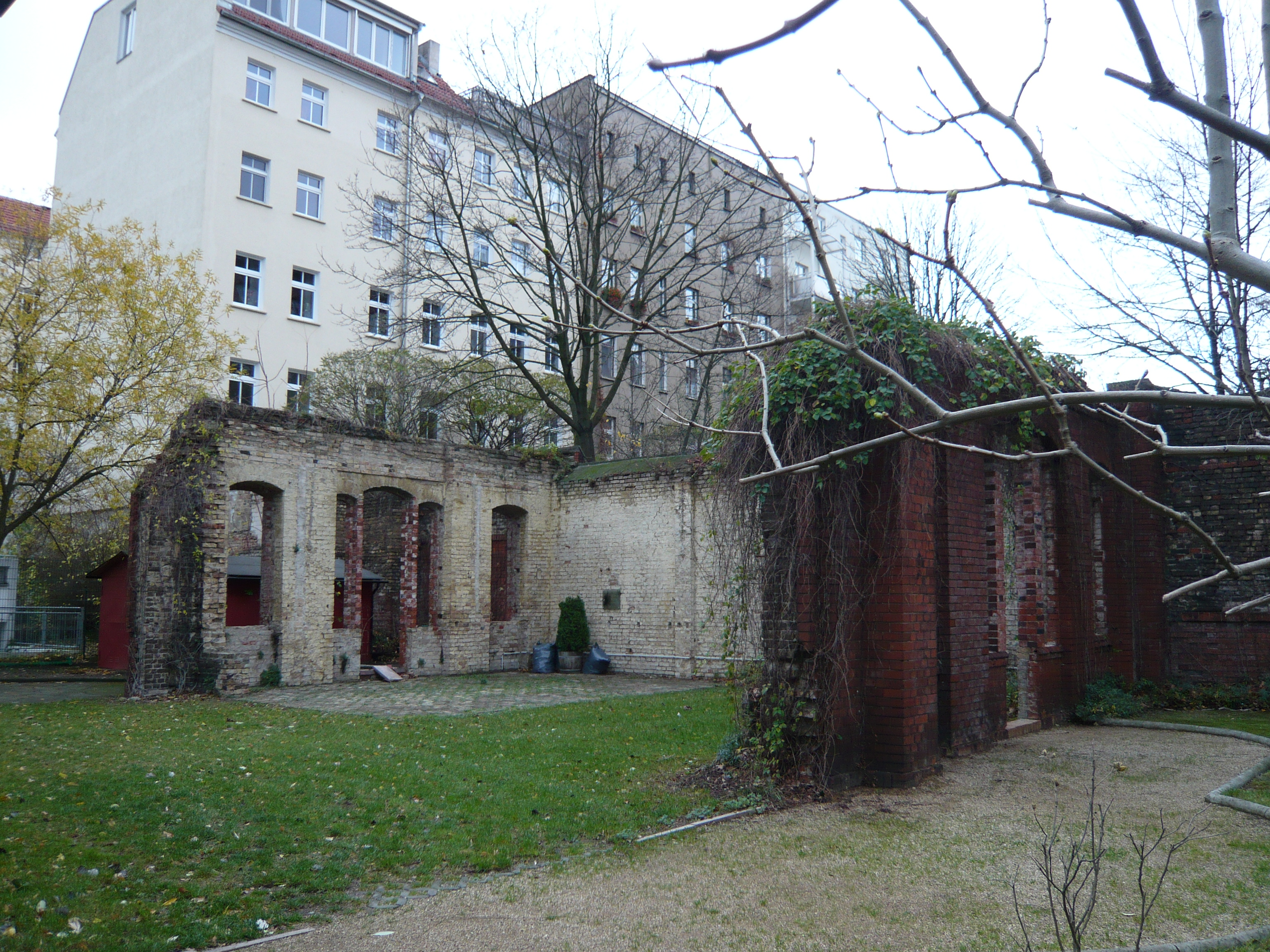 Mauerrest der Elimkirche, auf dem Grundstück ist jetzt auch die Christuskirche (aber nicht im Bild) (1)